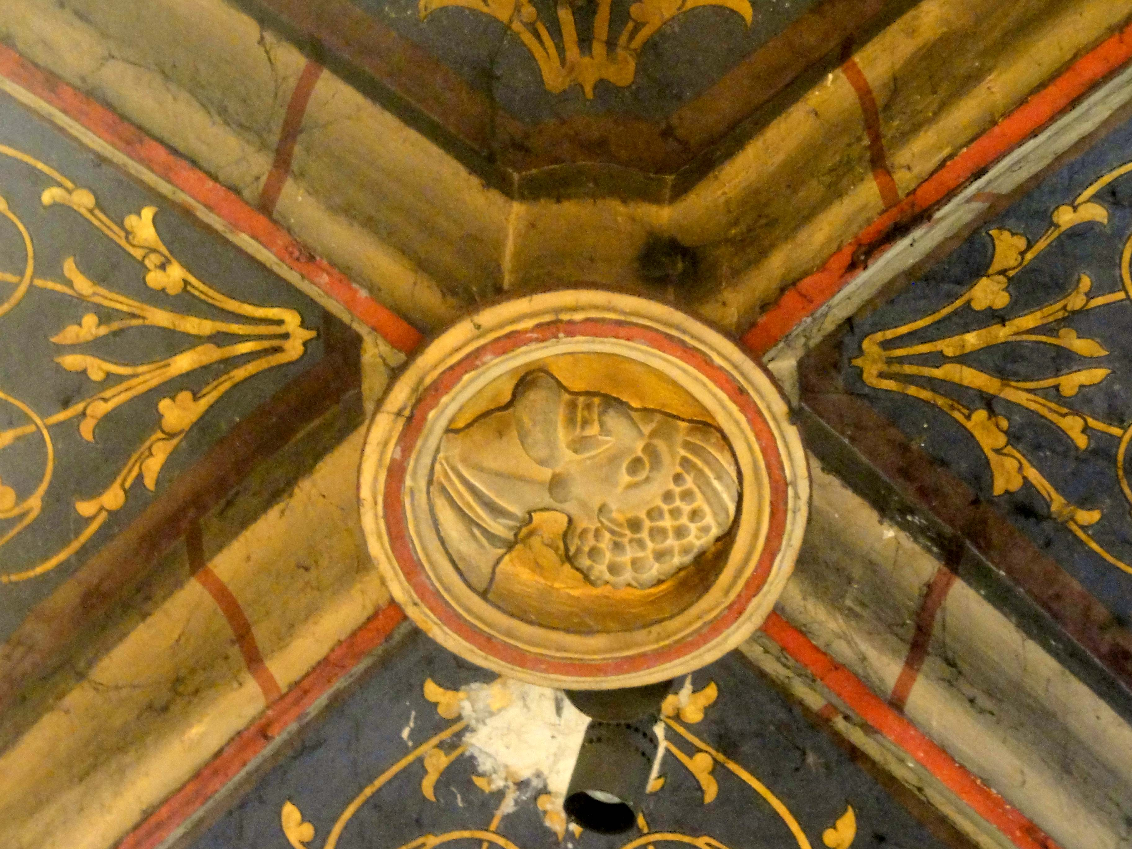 Clé de voûte (voir titre).